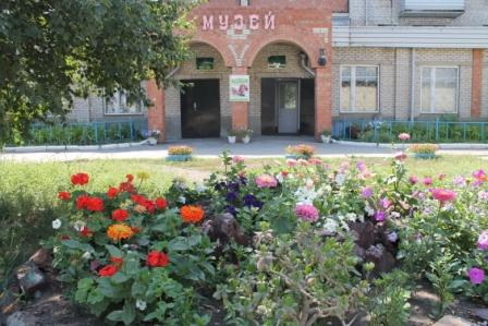 Сибайский историко-краеведческий музей г.Сибай Башҡортса: Сибай ҡалаһының тарих һәм тыуған яҡты өйрәнеү музейы